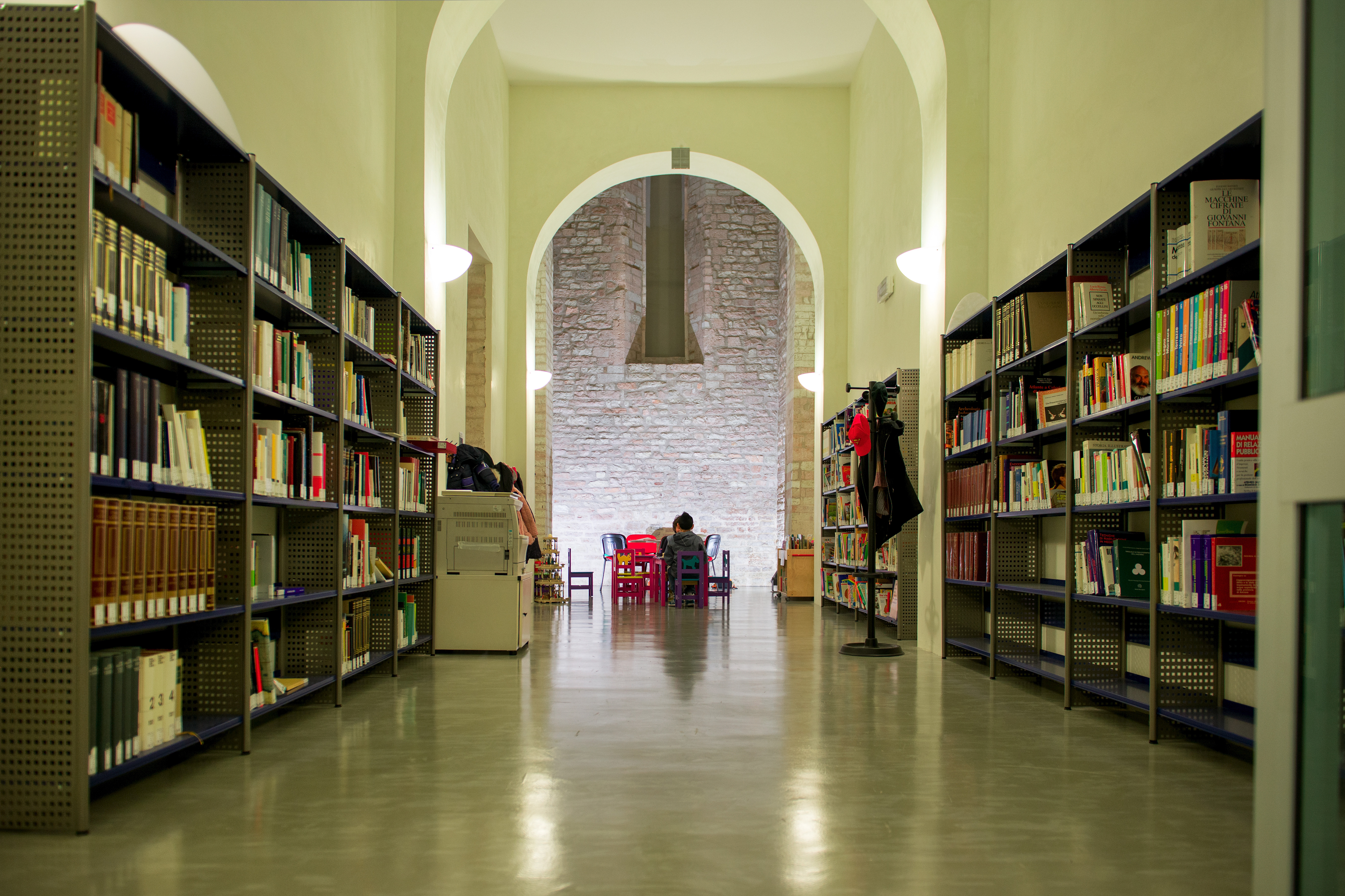 Biblioteca Multimediale Romualdo Sassi This is a photo of a monument which is part of cultural heritage of Italy.